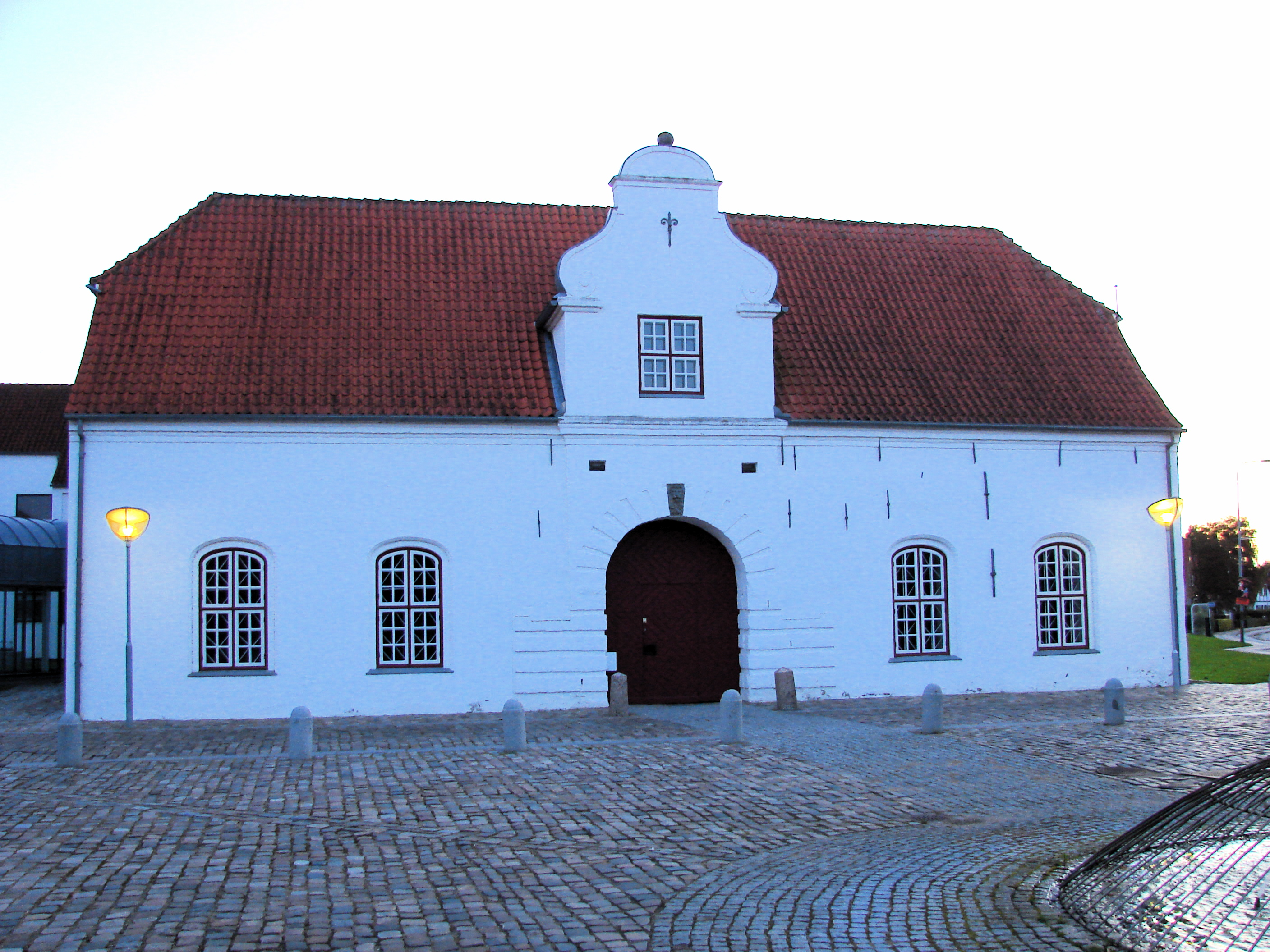 Portbygning fra Tønderhus, Tønder, Sønderjylland